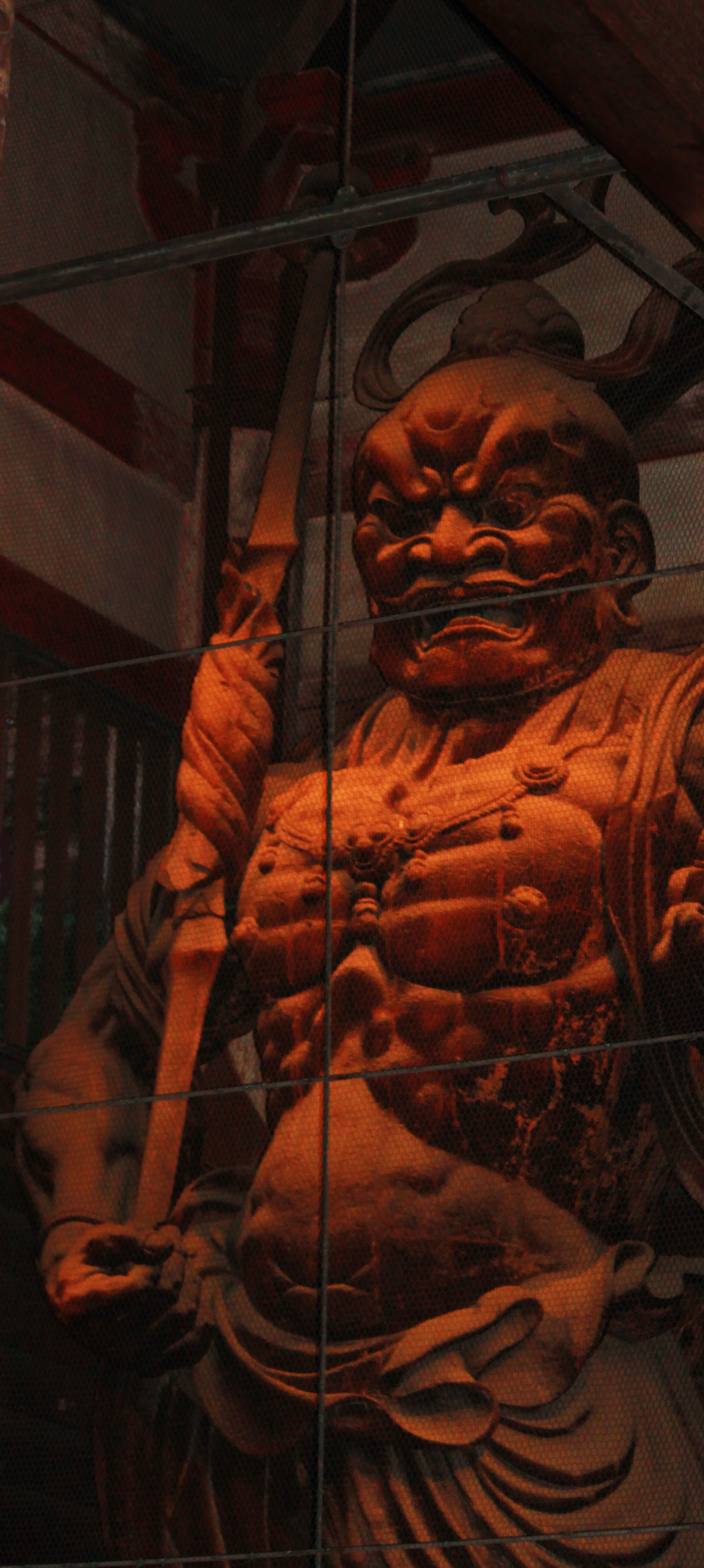 Niō (Angyō), Tōdaiji, Nara.